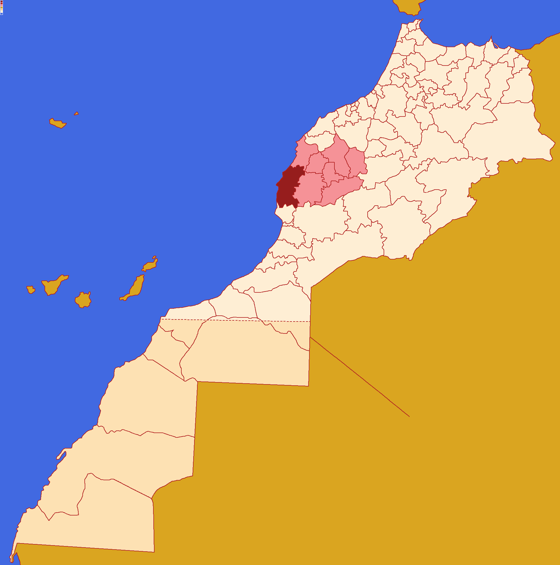 Localização da província de Essaouira ,dentro da região de Marraquexe-Safim e dentro de Marrocos. Conforme a reforma administrativa de 2015.